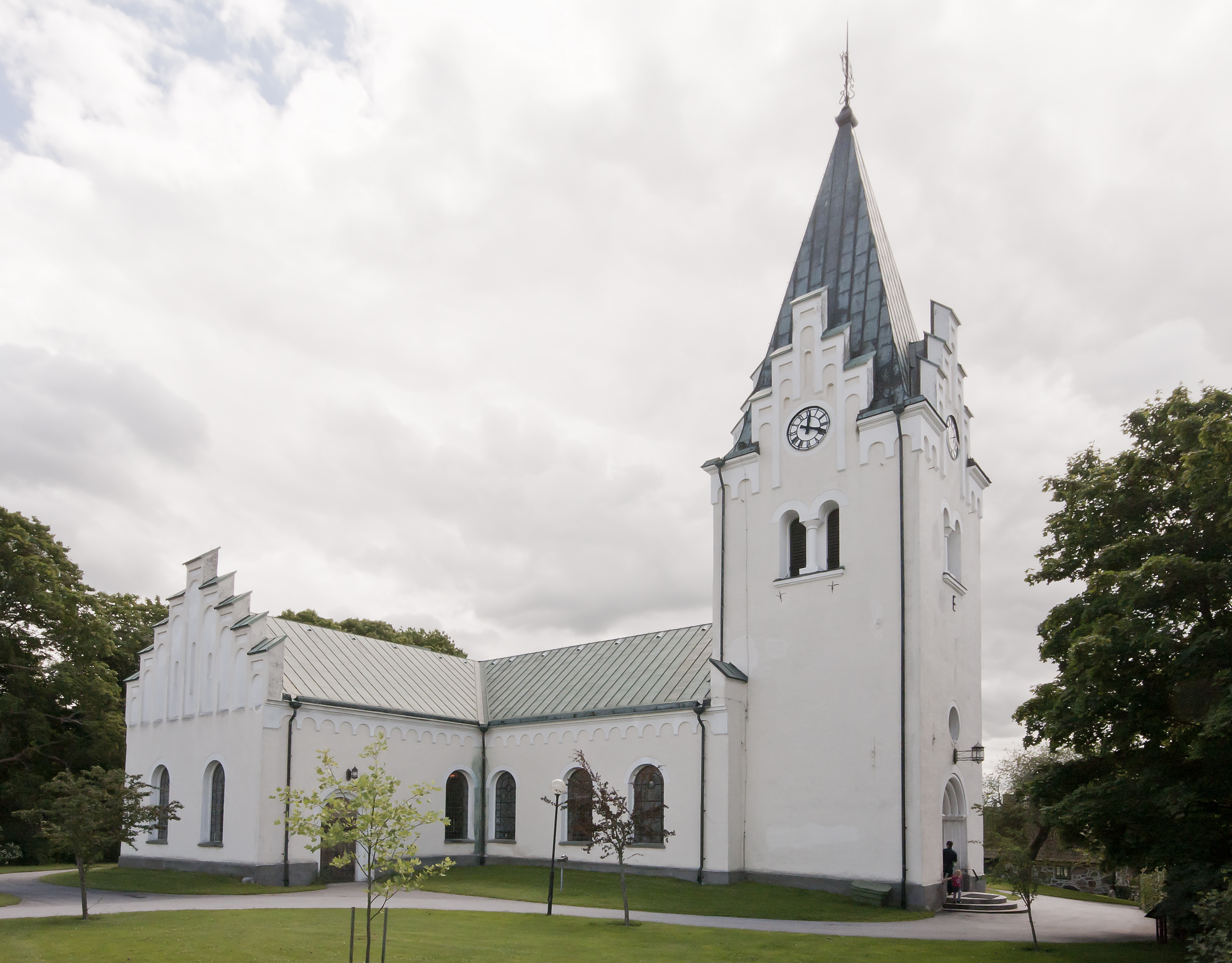 Höörs kyrka.